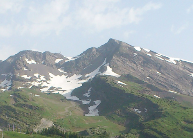 Les Hauts-forts depuis Avoriaz